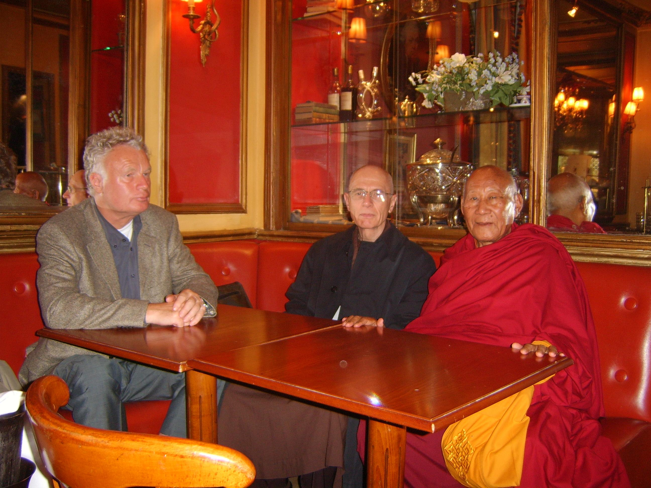 Maîtres bouddhistes Pâsâdika et Lobsang Tengyé